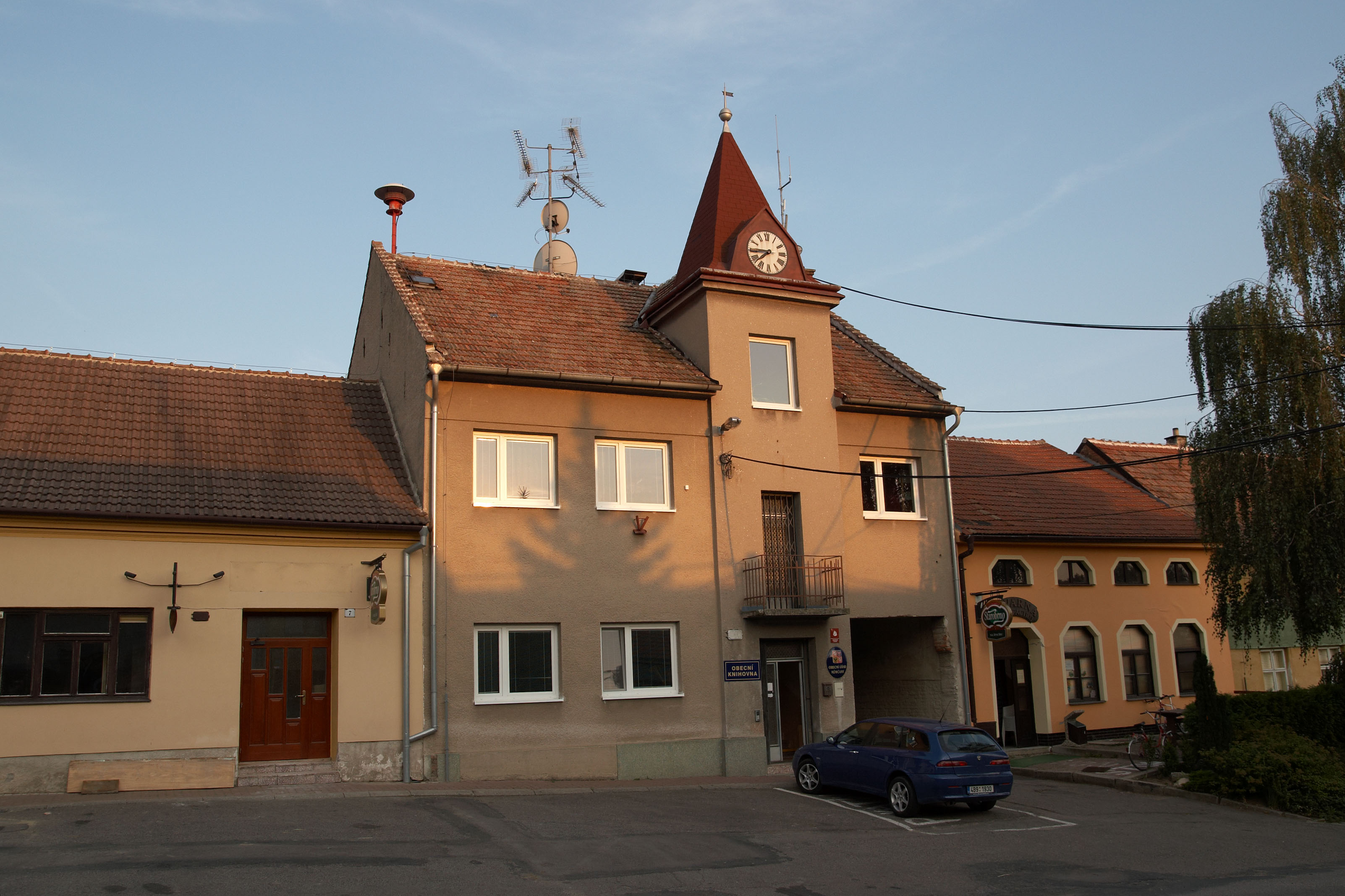 Obecní úřad v Němčanech